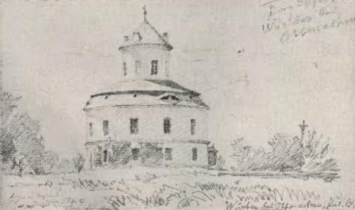 Zamek w Wierzbnej na obrazie Blätterbauera